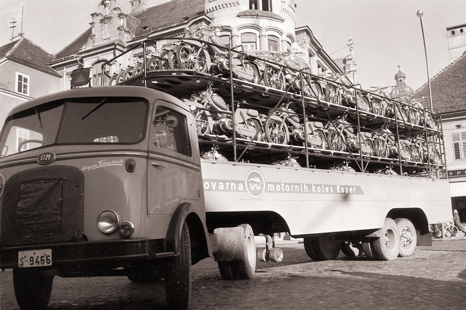 Tomosova prikolica na Glavnem trgu v Mariboru.